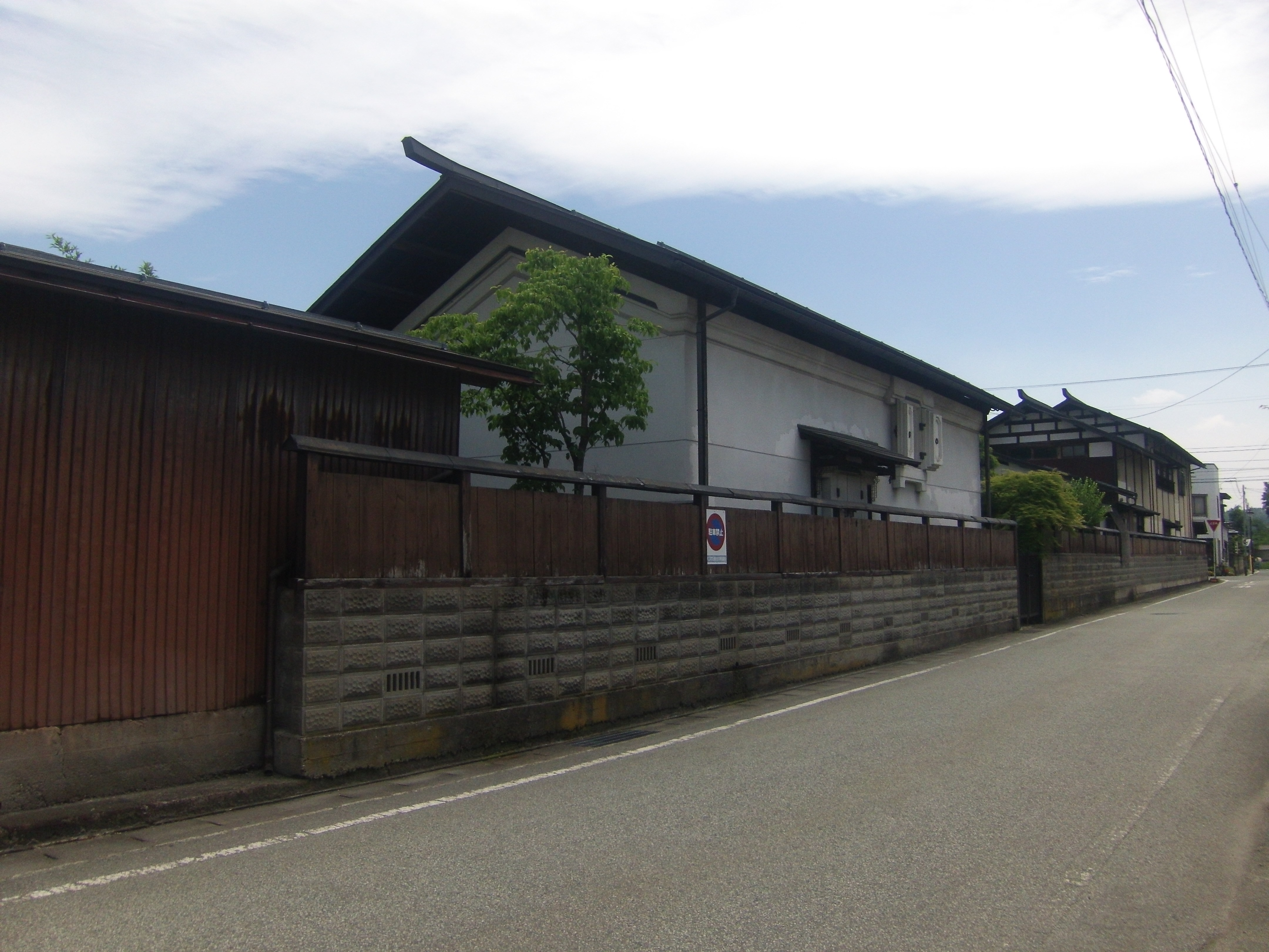 重文景「最上川の流通・往来及び左沢町場の景観」：内町小漆川地区の山家家（検断）